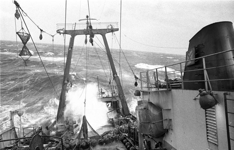 DDR, Hochseefischerei ADN-ZB/Sindermann 13.10.89 Rostock: Fischerei Die Arbeit auf hoher See bei Wind und Wetter verlangt den ganzen Mann. Die Werktätigen der Hoch-, See- und Küstenfischerei wollen trotz aller Schwierigkeiten bei der Reproduktion der Fangflotte und Verarbetungsbetriebe im 40. Jahr der DDR eine Fischproduktion von nahezu 125.000 Tonnen erreichen.